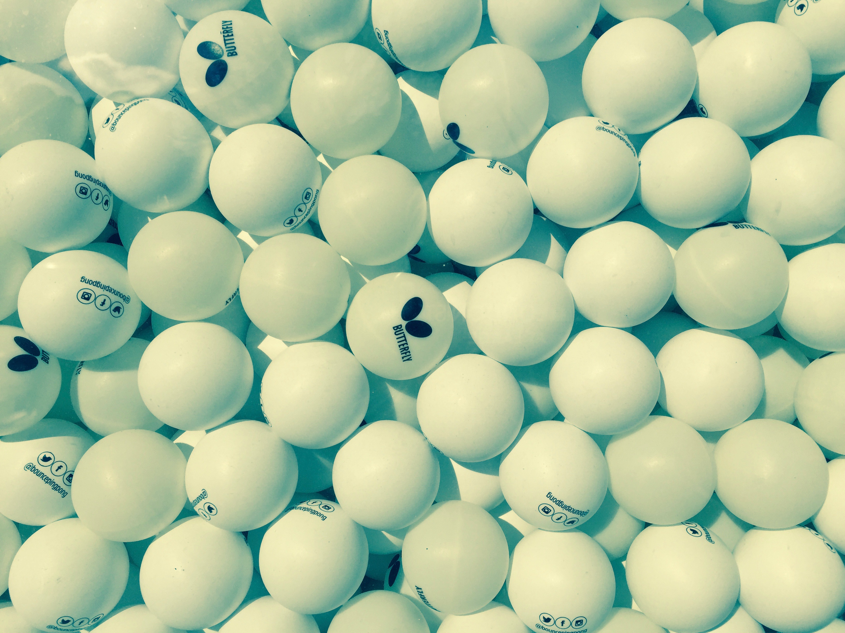 Ping Pong